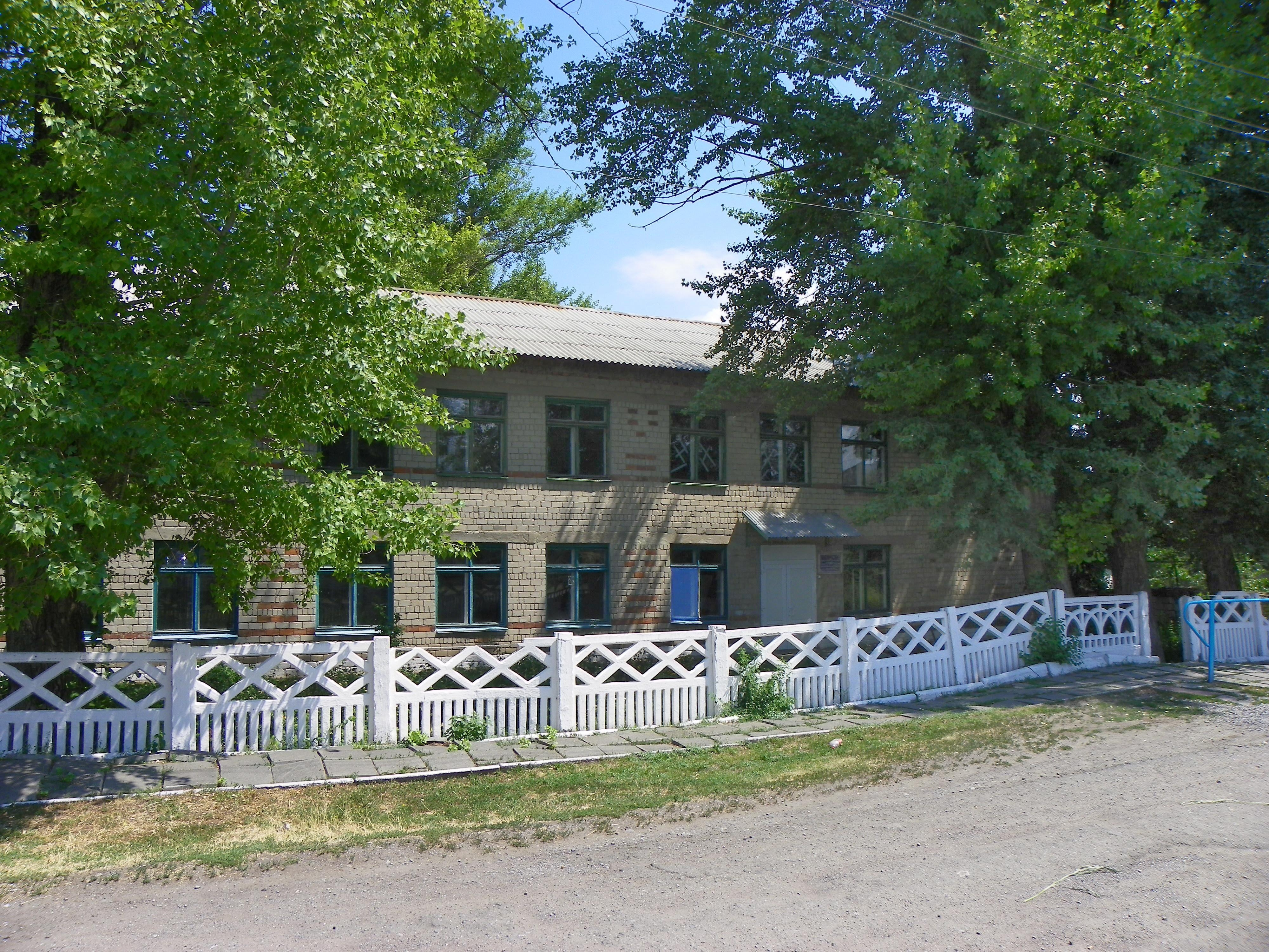 Школа у селі Придорожньому Старобешівського району Донецької області.